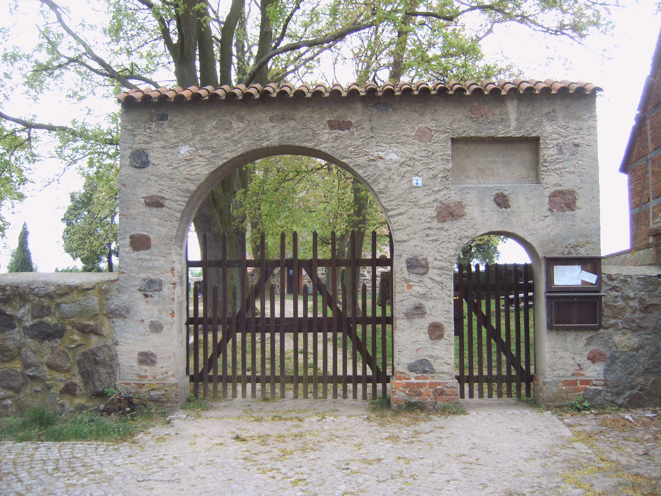 Zugangstor zur Dorfkirche von Buchholz (Altmark)